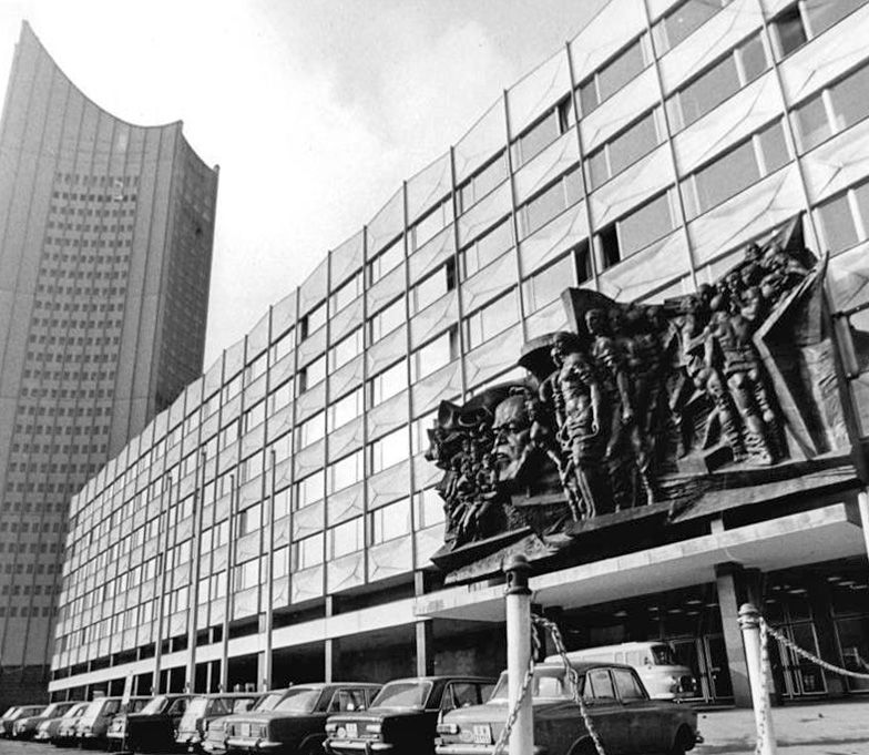 Leipzig, Universitätshochhaus ADN-ZB Raphael 7.3.75 Leipzig-Die Karl-Marx Universität der Messestadt gehört mit zu den bedeutensten Lehr- und Forschungseinrichtungen der DDR. In der 1409 gegründeten Alma mater wurden wurden in den vergangenen Monaten die modernsten Hochschuleinrichtungen unserer Republik in Betrieb genommen. Insgesamt 3300 Seminarplätze in Räumen mit 15 und 30 Räumen (einschließlich spezieller Konsultationsräume) bieten 5000 Studenten die Möglichkeit eines intensiven Studiums. Der Stundenplan des Seminargebäudes basiert auf dem Prinzip des Schichtunterrichts, wodurch die Gewähr gegeben ist, dass die modernen Einrichtungen voll ausgenutzt werden. P0307-1N -Bitte auch die Motive P0307-2 u. 3N beachten!)